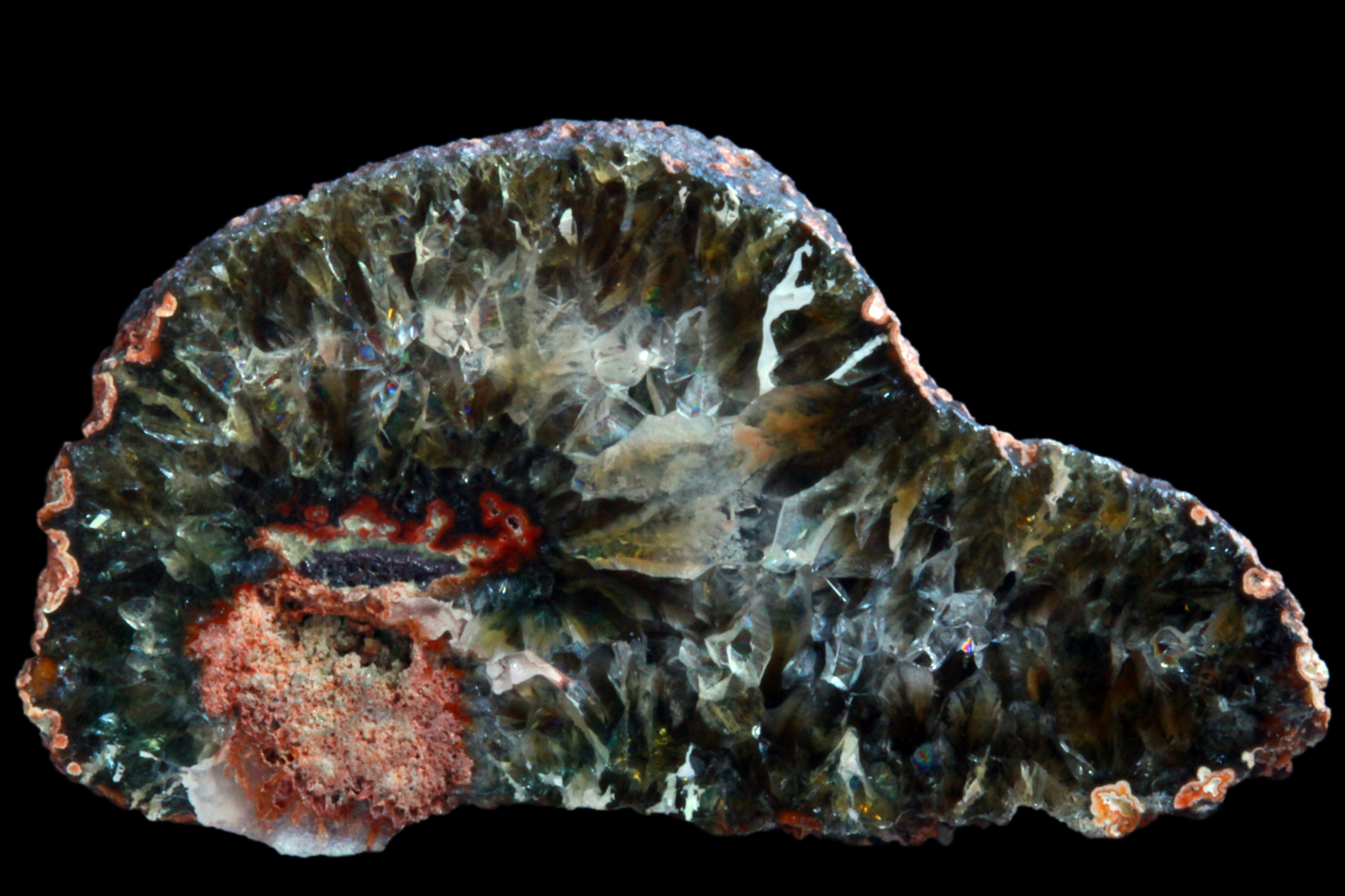 Prasiolit w geodzie (strefa krustalna) - Płóczki Górne, Poland. 1